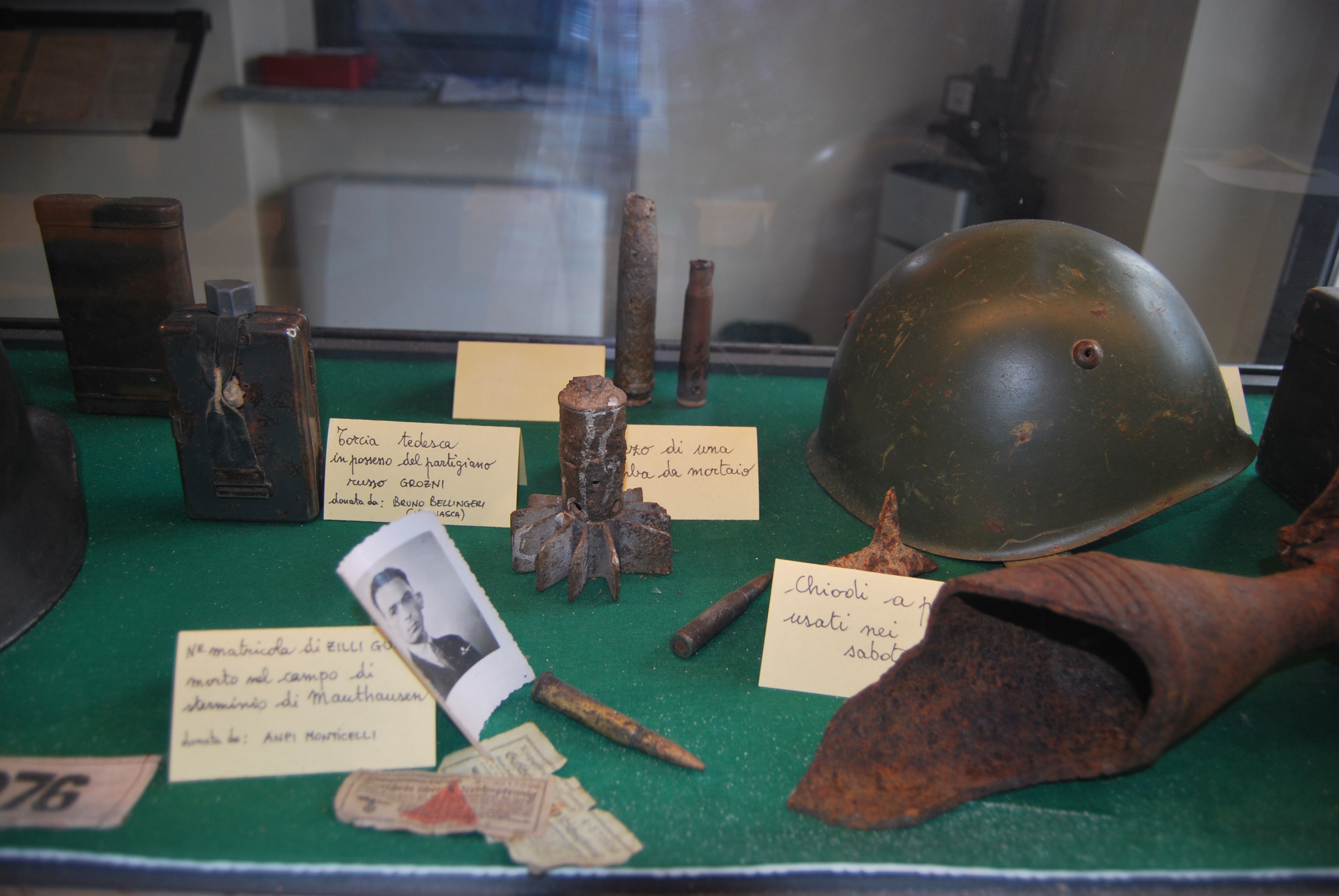 Chiara Carrera, opera propria, elmetti, pubblico